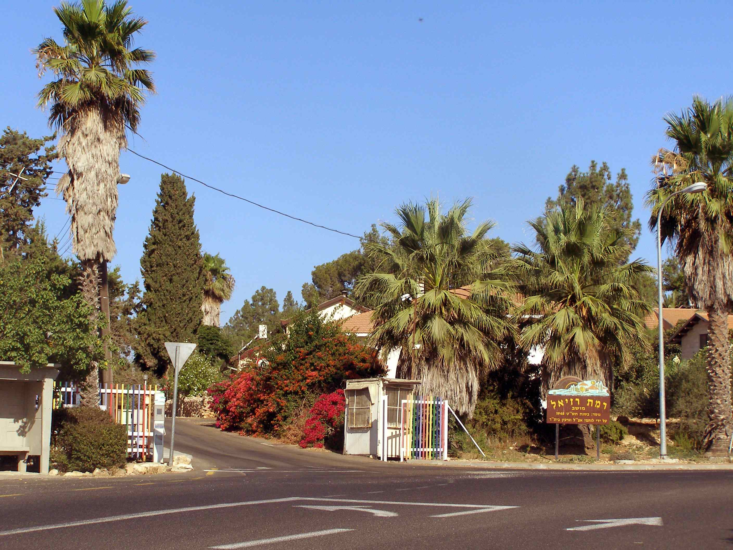 entrance to Ramat Raziel, Israel